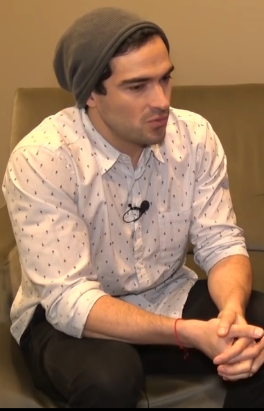 Alfonso Herrera habla de sus metas como cantante y sobre su primer bebé